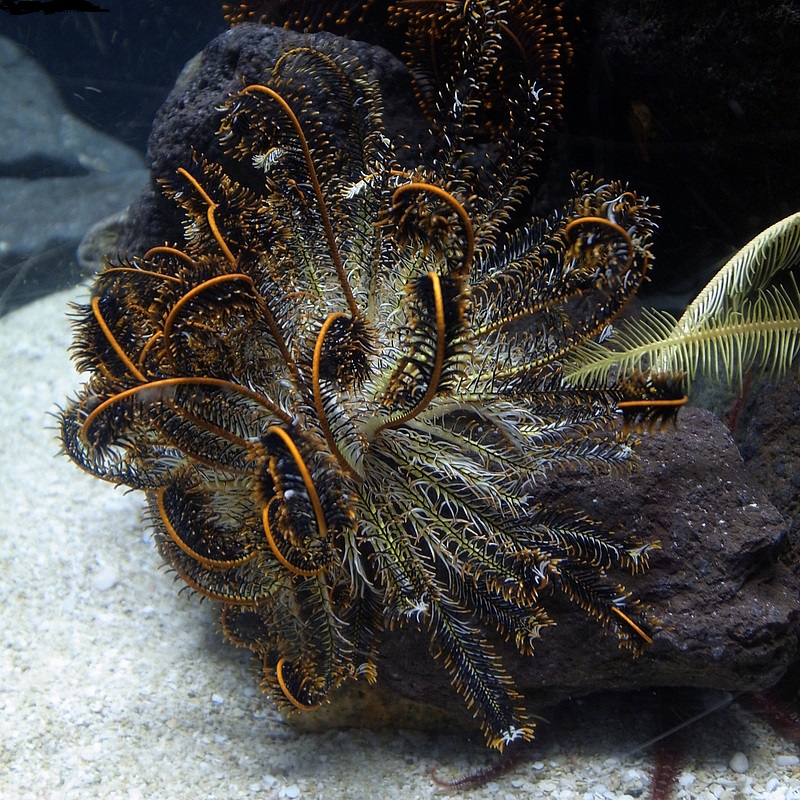 Oxycomanthus japonicus en Suma Aquapark Japón